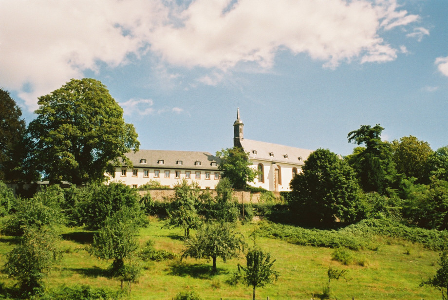 Abtei Neuburg in Heidelberg-Ziegelhausen